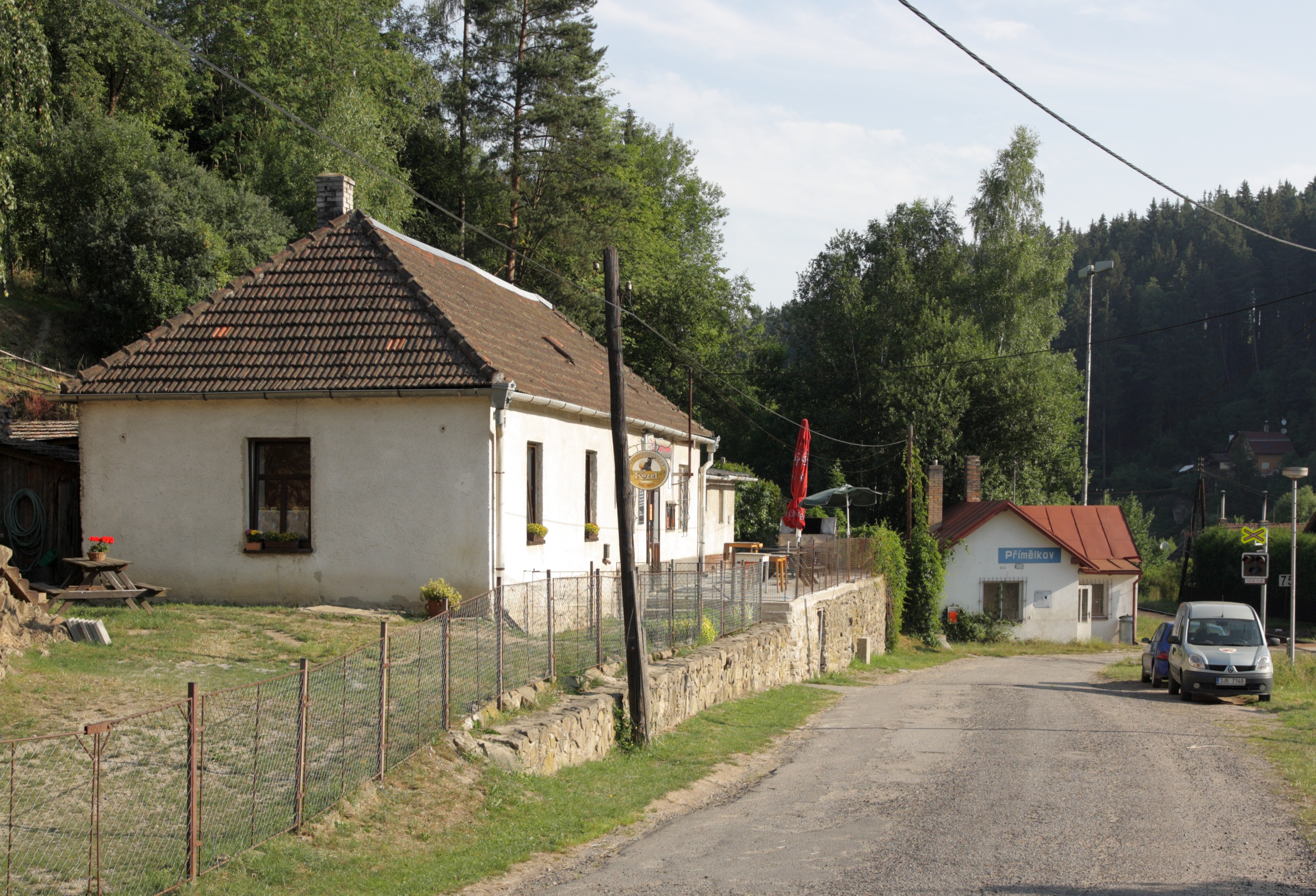 Přímělkov - hospoda Nad Přejezdem a železniční zastávka.